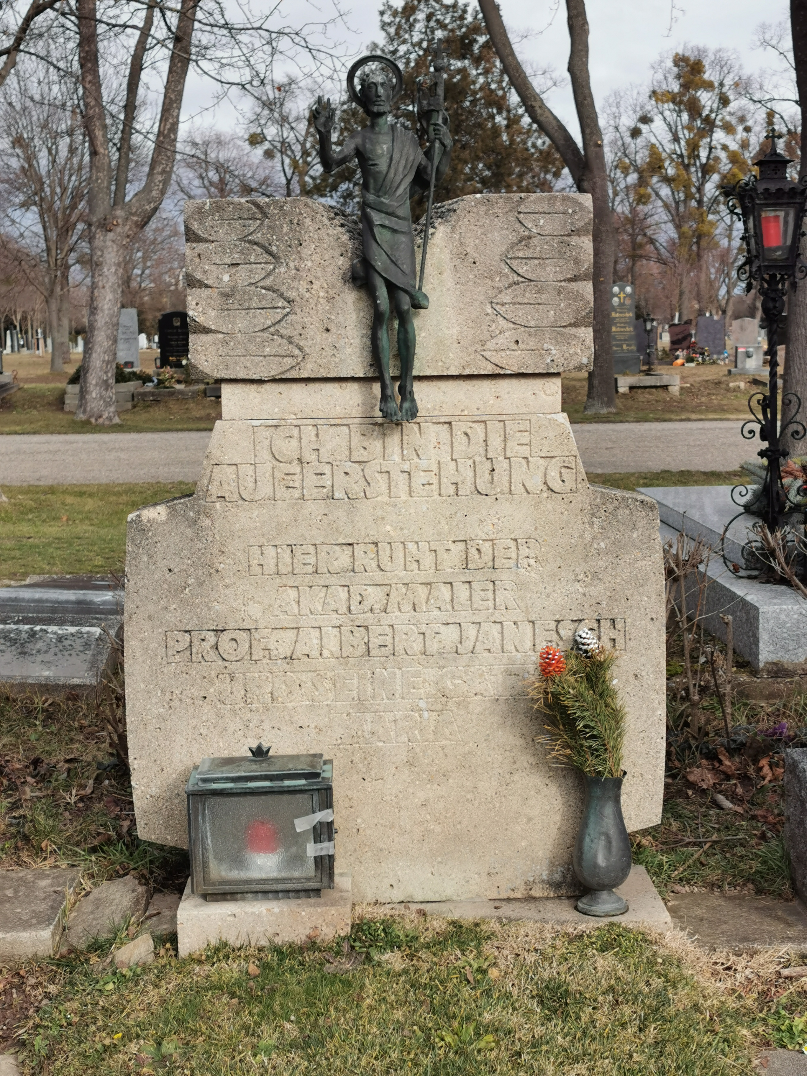 Grab von Albert Janesch auf dem Wiener Zentralfriedhof